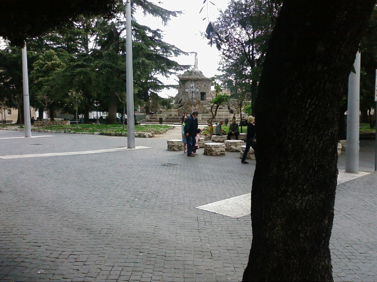 Veduta di Piazza XIX Marzo a Cisterna di Latina